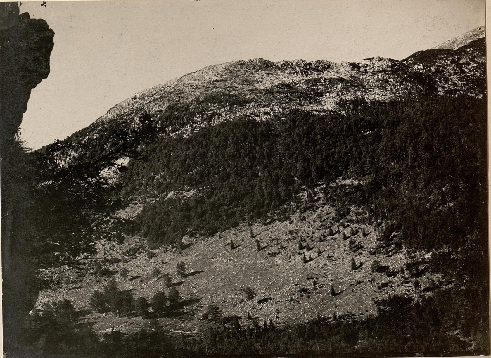 Feindliche Stellungen am Krasji Vrh Hang. Verbindung zwischen Krasji Vrh und Talsperre. Standpunkt: Artillerie Beobachter am VRSIC. aufgenommen am 30. Juni 1916.